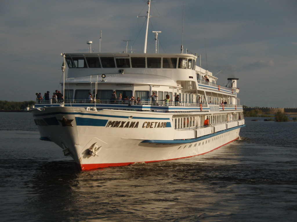 Теплоход Михаил Светлов подходит к причалу